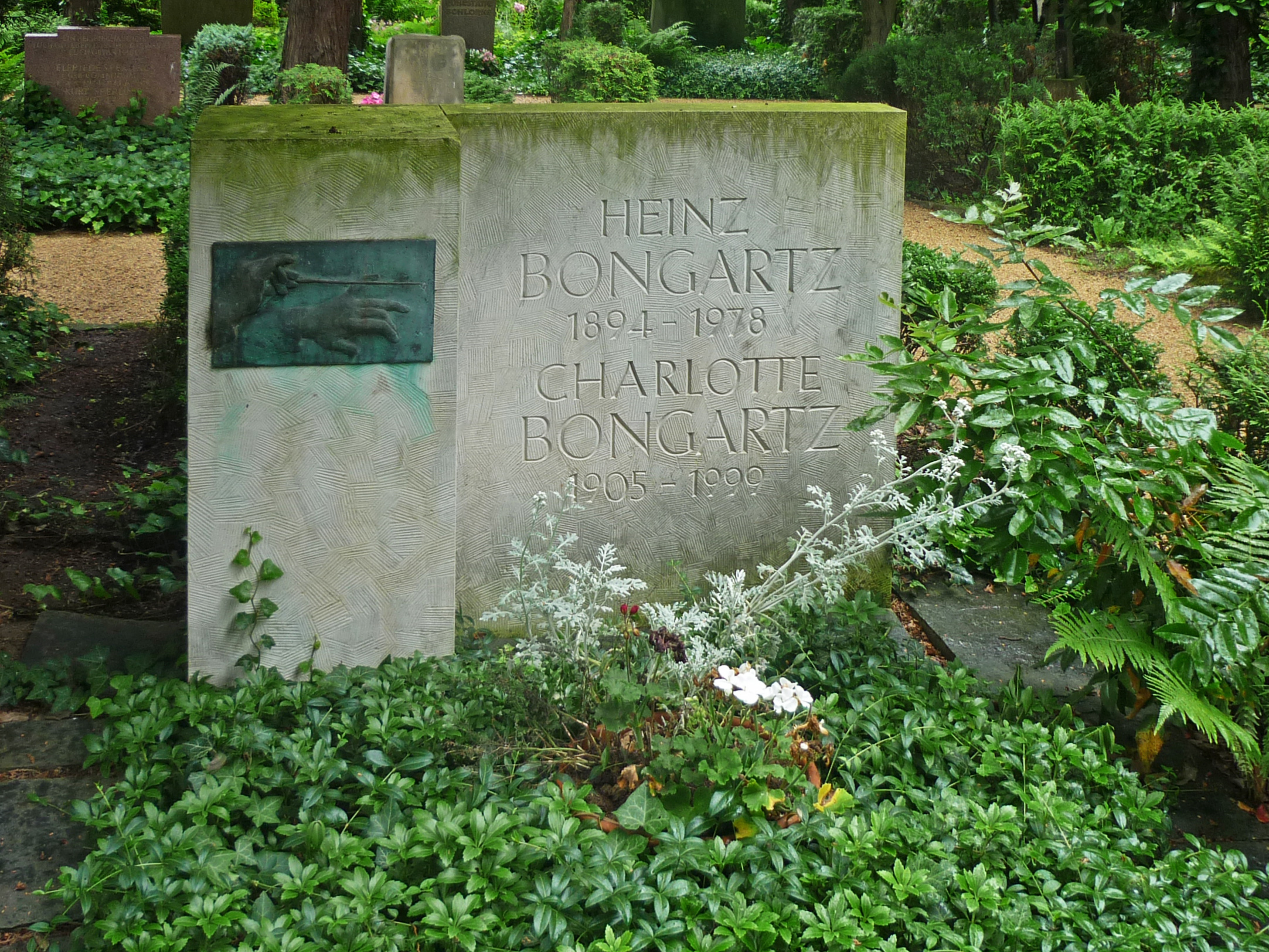 Dresden. Loschwitzer Friedhof: Grabstätte von Heinz Bongartz (1894–1978), Dirigent